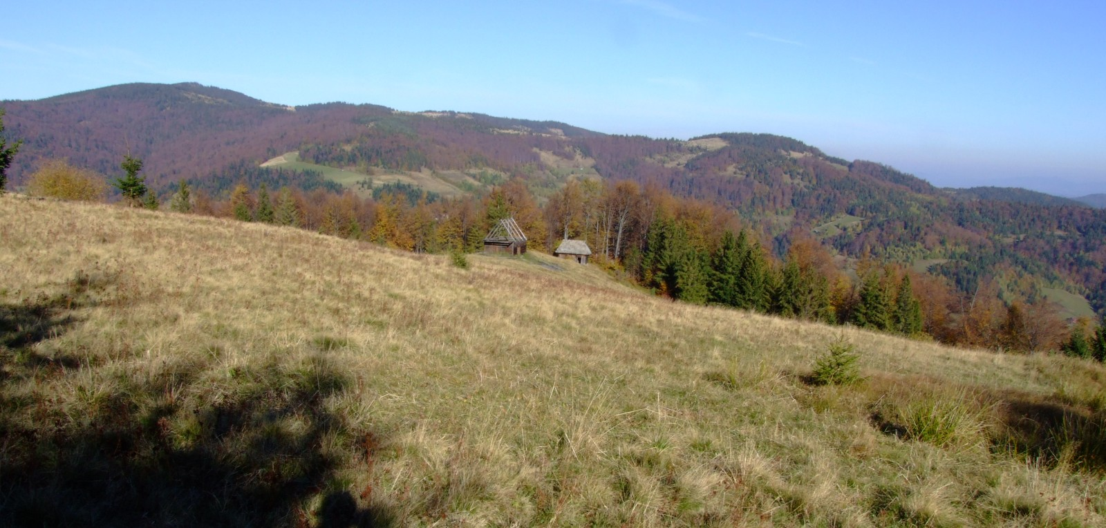 Kosarzyska w Ochotnicy Górnej. W głębi Gorc i Piorunowiec